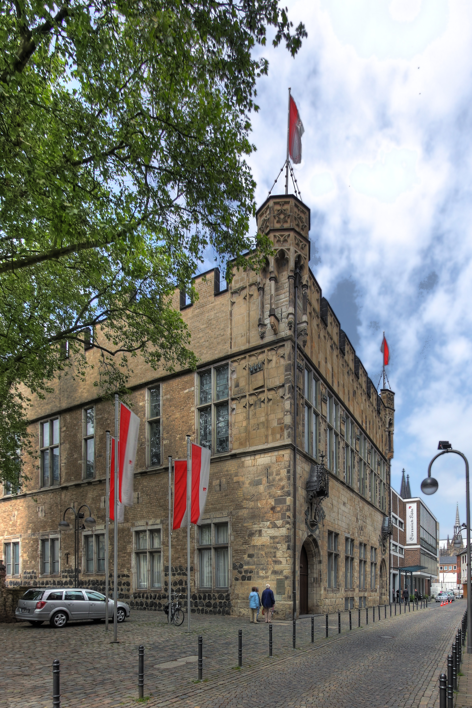 Gürzenich Köln, Südostansicht Ecke Gürzenichstraße/Martinstraße This is a photograph of an architectural monument.